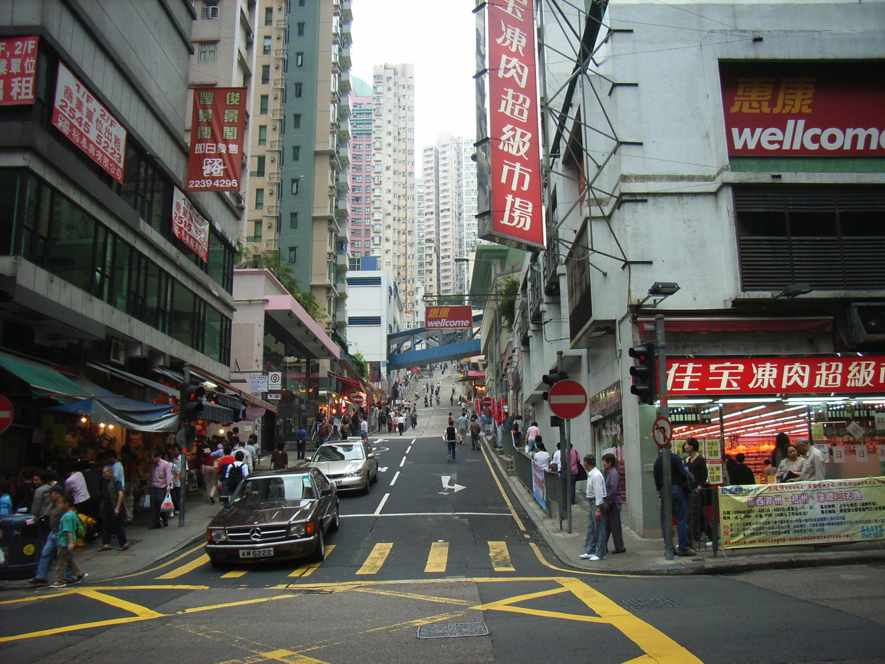 Sai Ying Pun 西營盤 正街中段